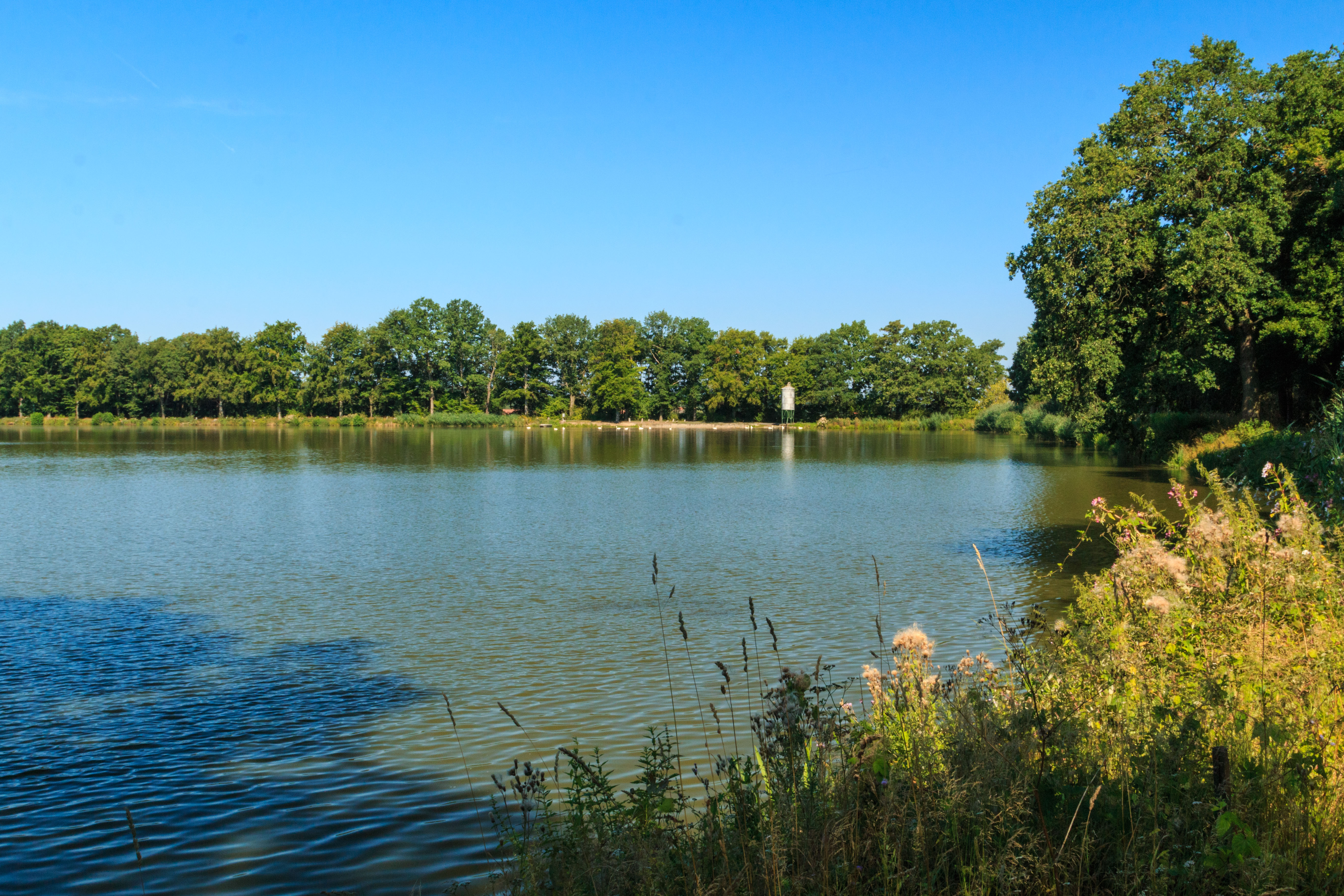 Rybník Velký Karlov Project: Vodstvo.